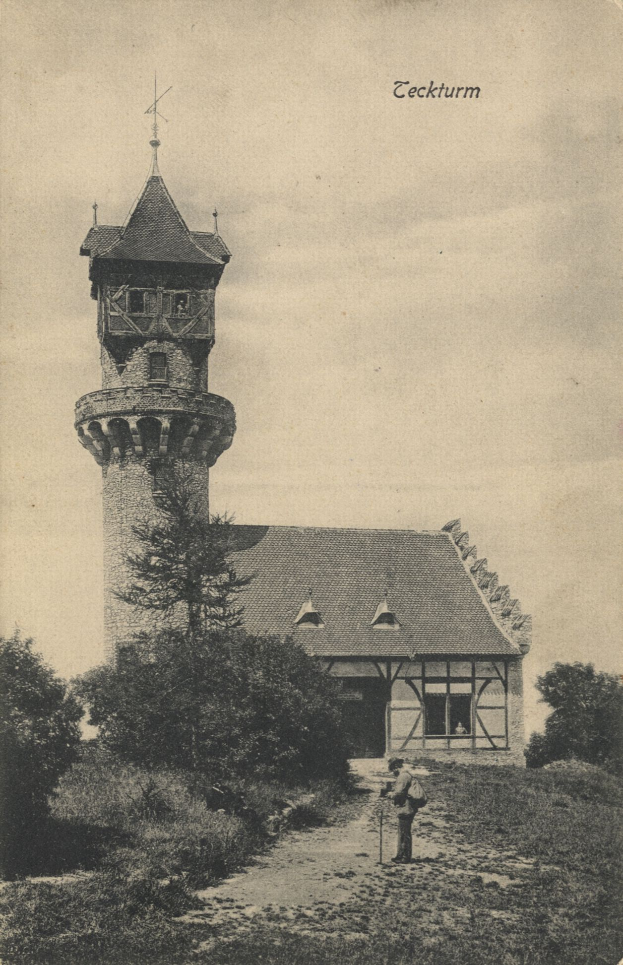 Teckturm der Stadt Bissingen an der Teck